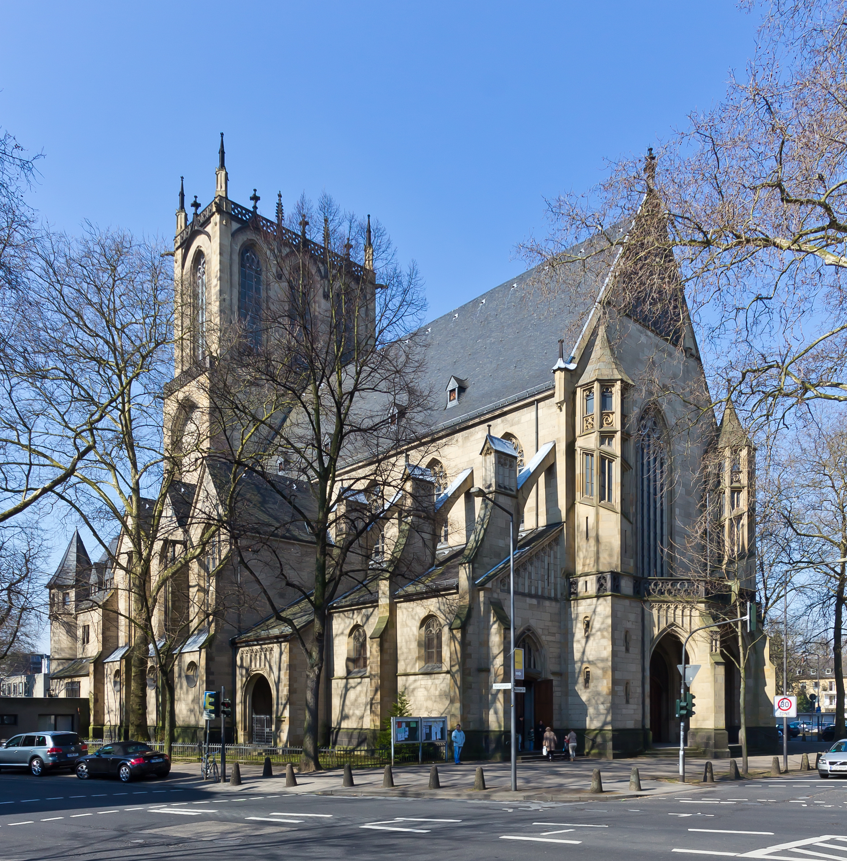 Kirche St. Paul, Köln-Neustadt-SüdThis is a photograph of an architectural monument.